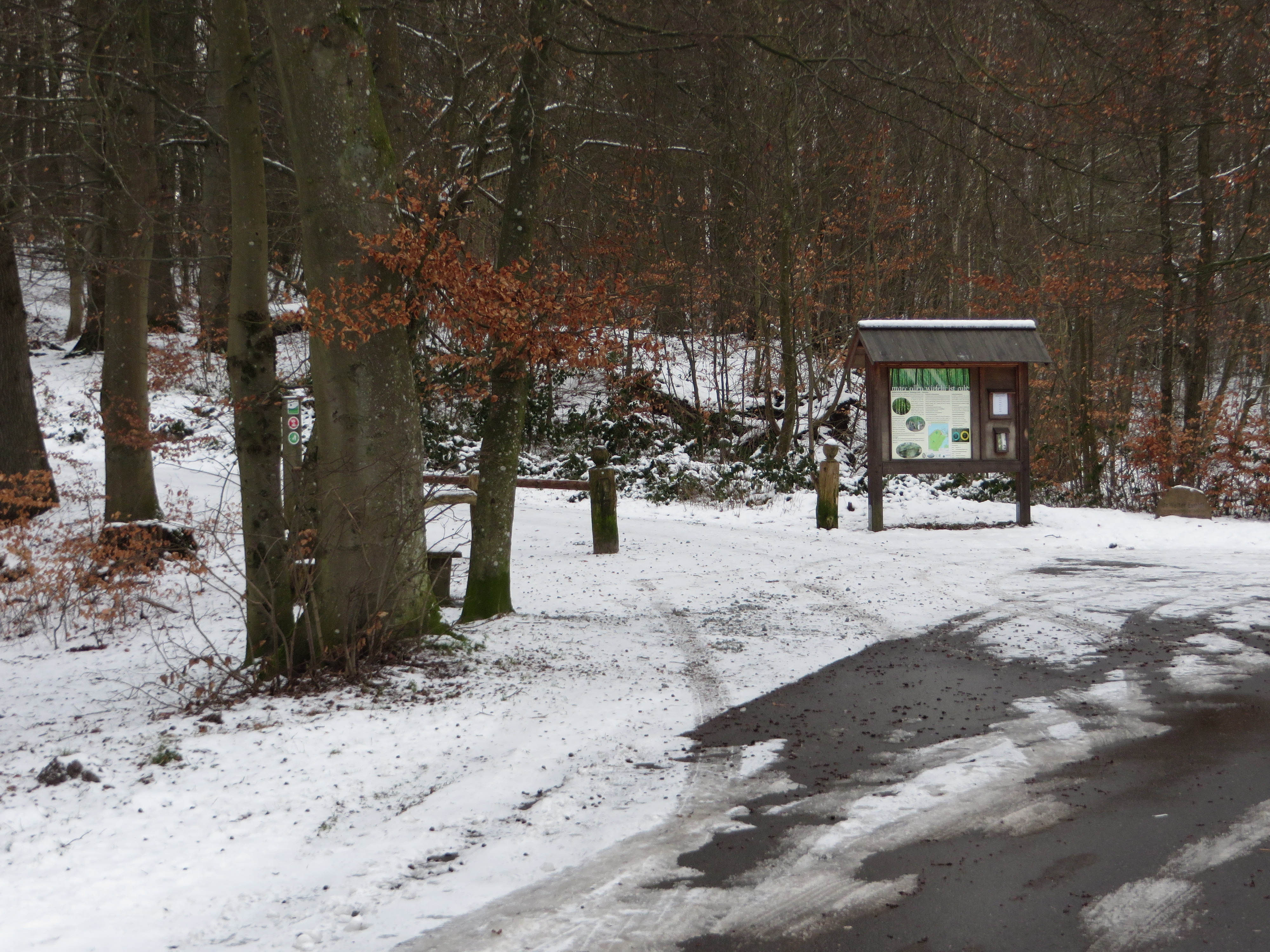 Waldrand bei Quellental (Glücksburg 3 Februar 2015)